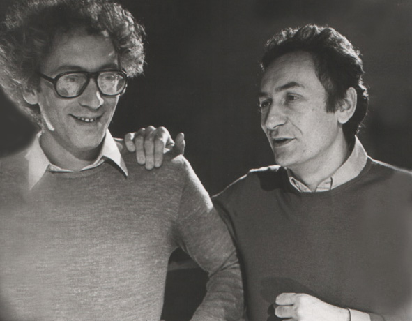 René Kalisky (à gauche) et Antoine Vitez (à droite)